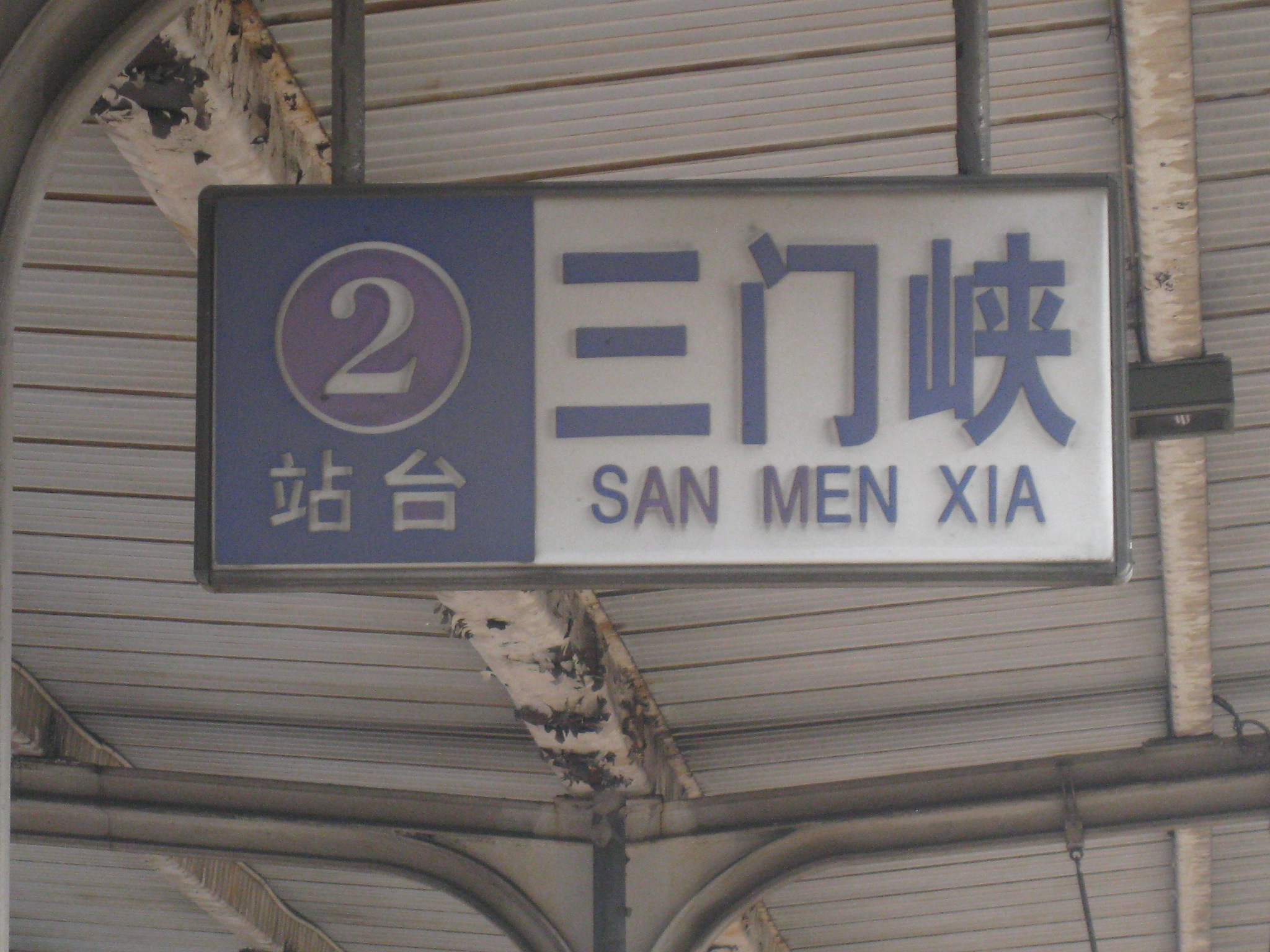 中文（中国大陆）: 三门峡站二站台